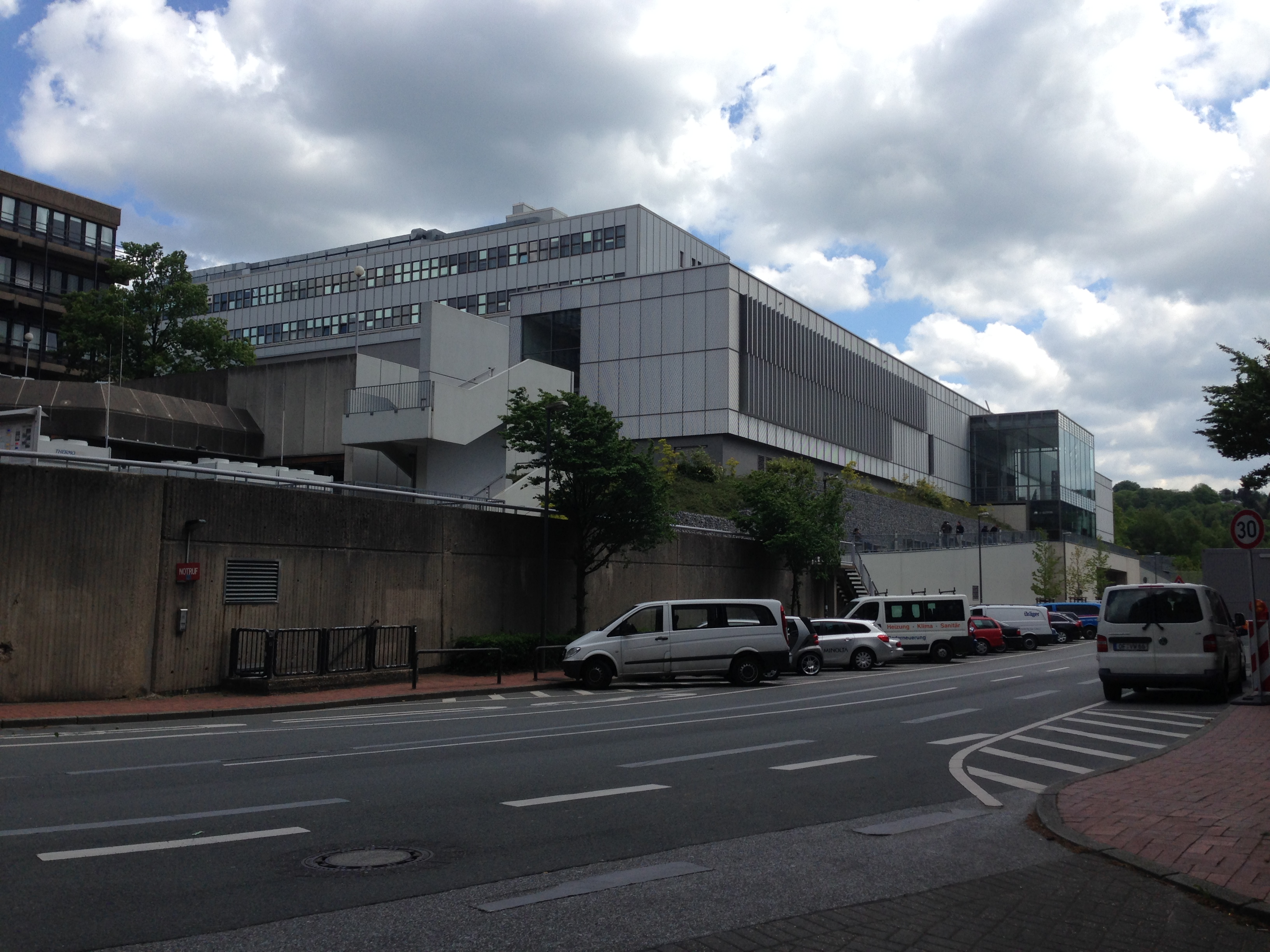 Hörsaalzentrum K und Gebäude I der Bergischen Universität.